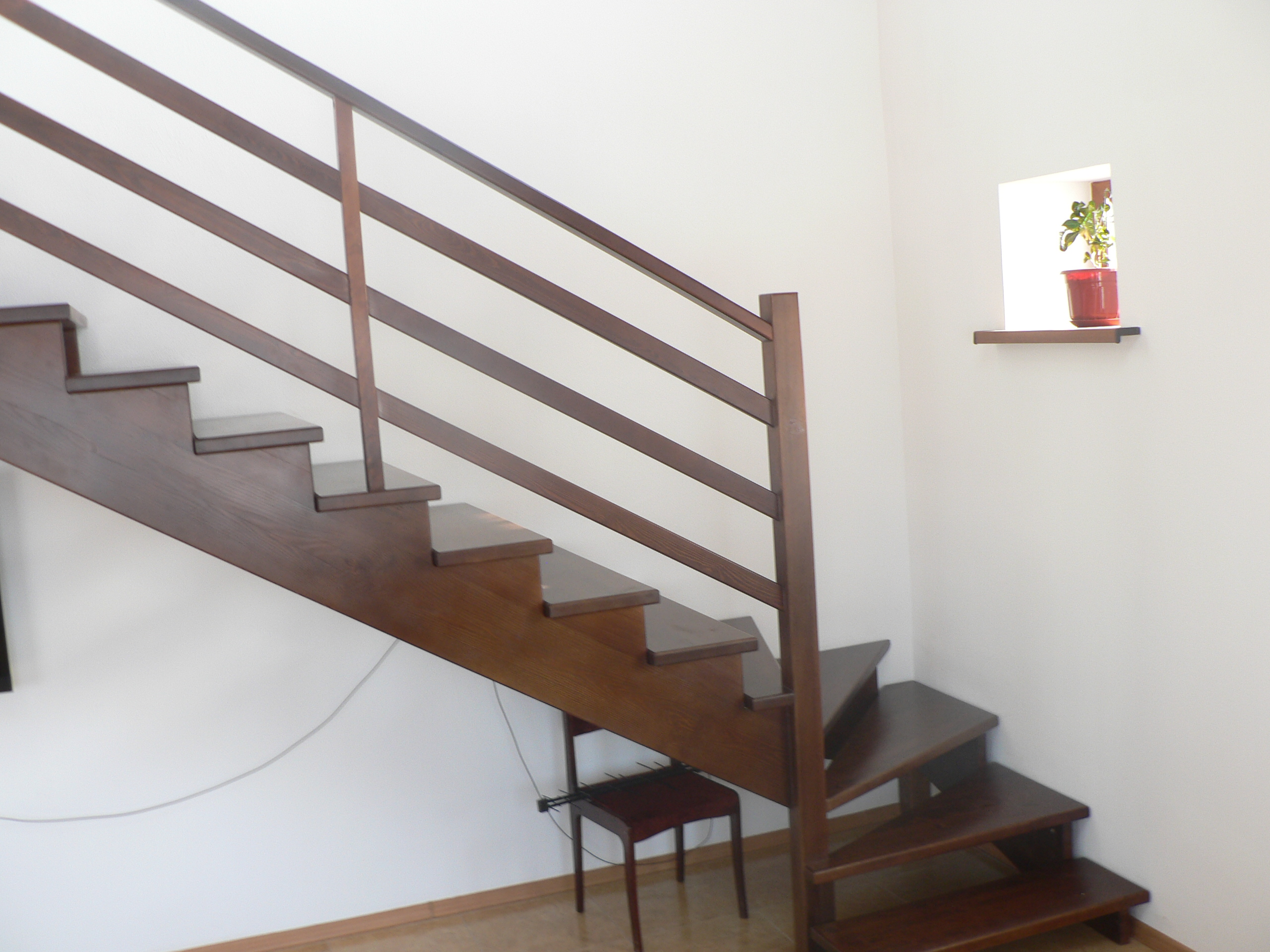 Лестница на 2 тетивах, ступени лежат в вырезах тетив. Форма лестницы - Г-образная.